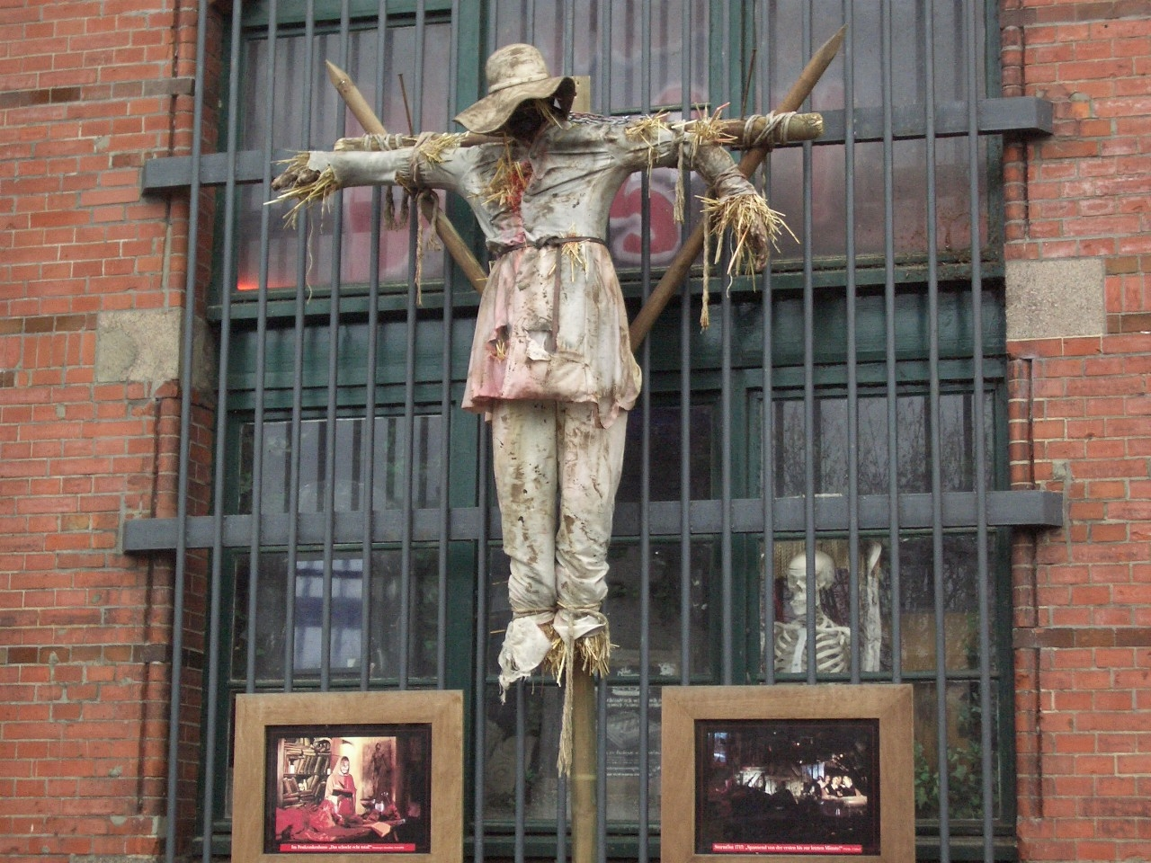 Eingangsbereich vom Dungeon